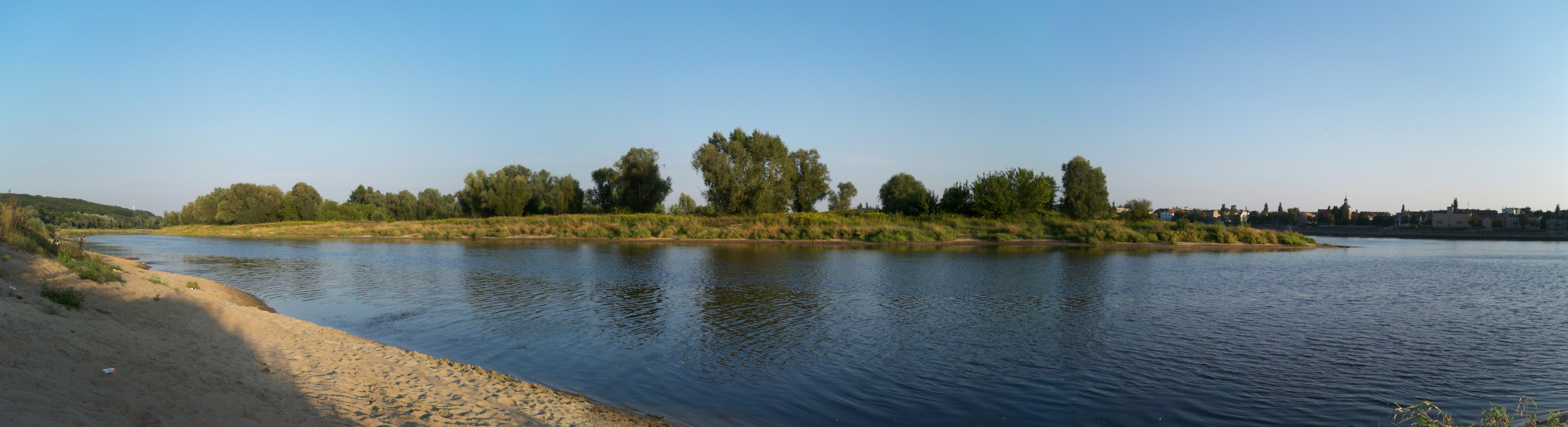 Wisła we Włocławku (2009 r.)